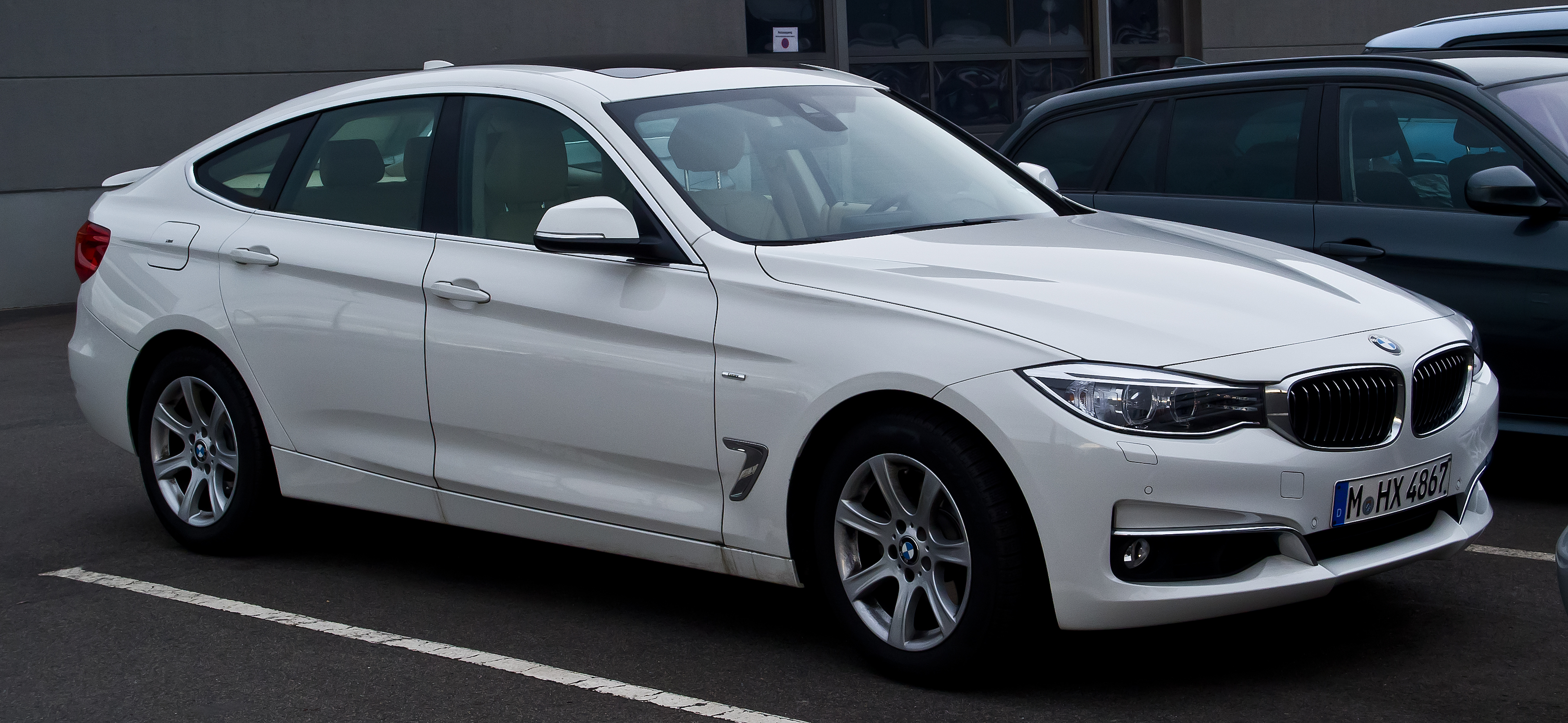 BMW 320d GT Luxury Line (F34)